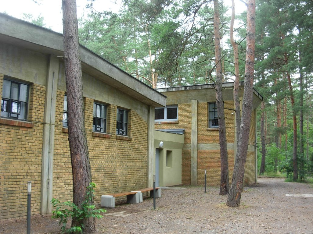 Eksploseum w Bydgoszczy